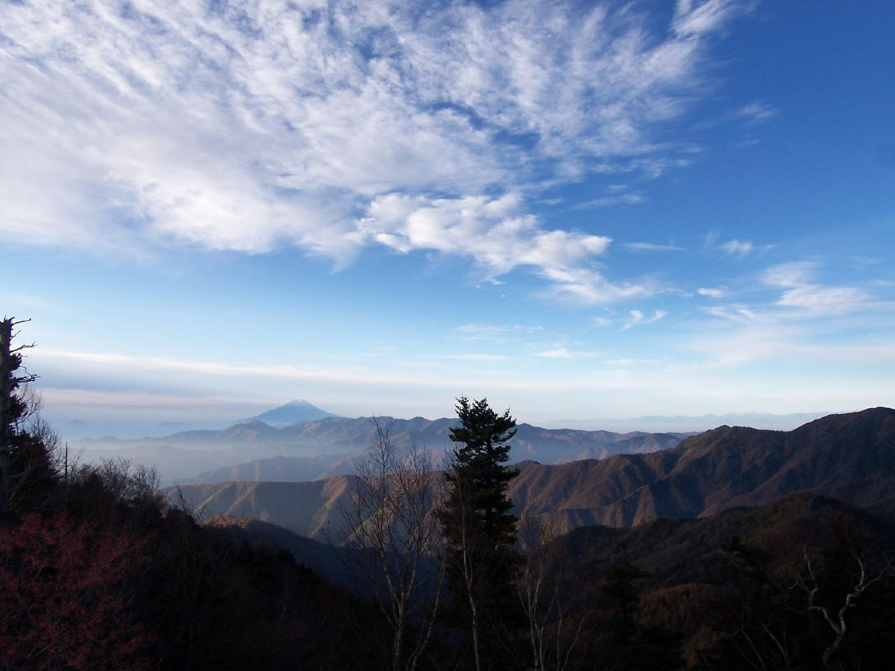 雲取山山頂から見た富士山(雲取山縦走) Mt. Fuji from Mt. Kumotori.